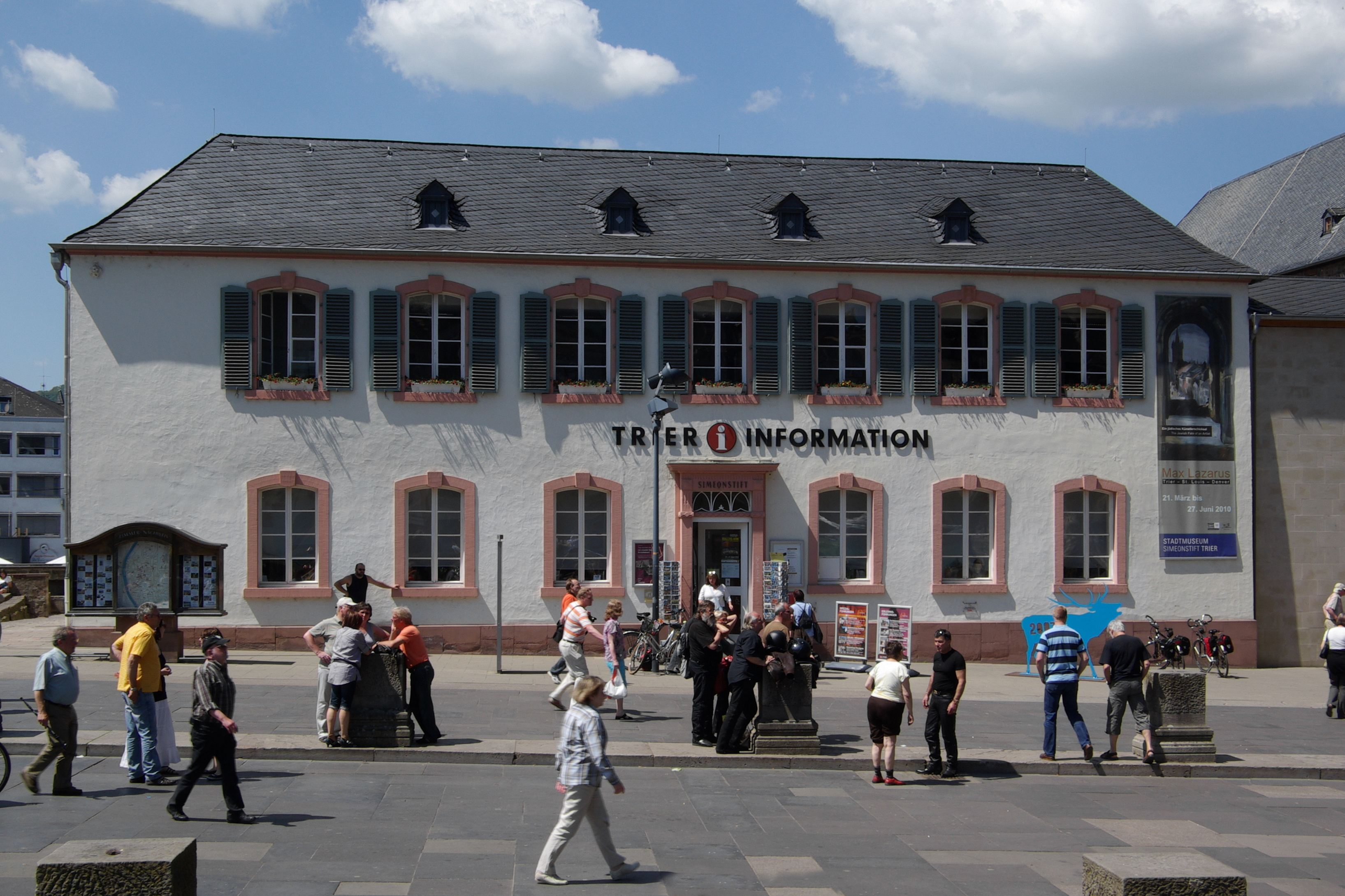 Trier, Simeonstraße 60: ehemaliges Stift St. Simeon, heute Städtisches Museum und Fremdenverkehrsamt, Ostseite